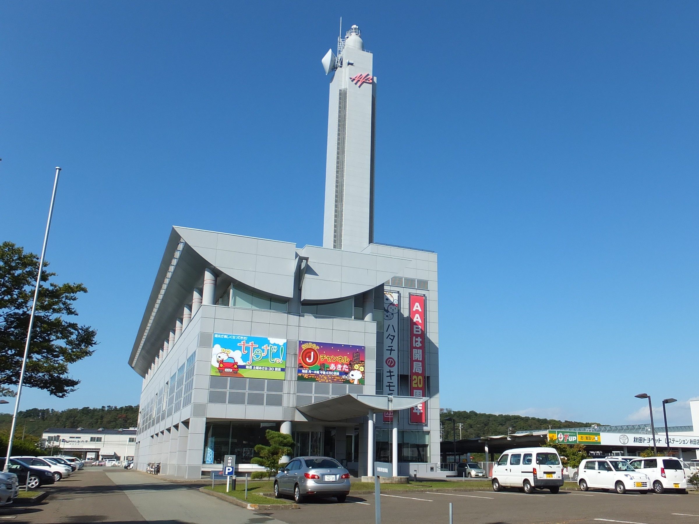 秋田朝日放送（AAB）本社 （秋田市川尻町字大川反）